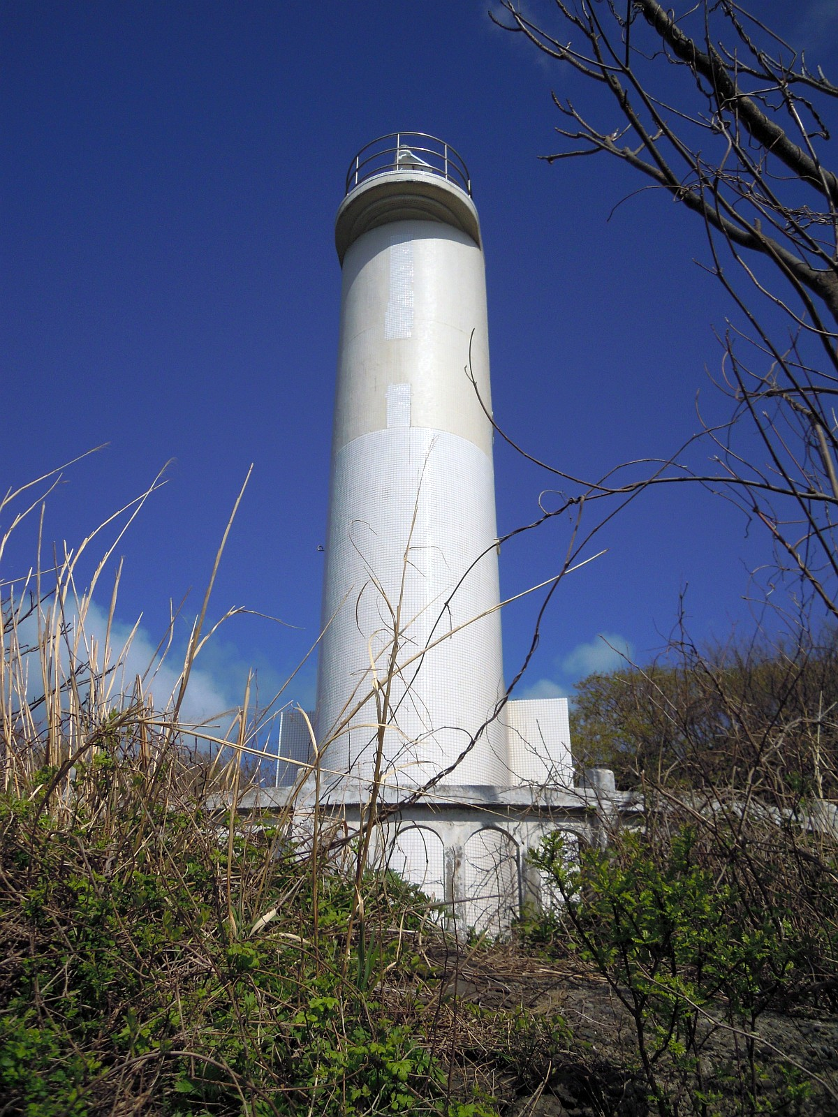 秋田県にかほ市と山形県飽海郡遊佐町に跨る三崎公園内にある羽後三埼灯台（灯台自体は遊佐町に所在）